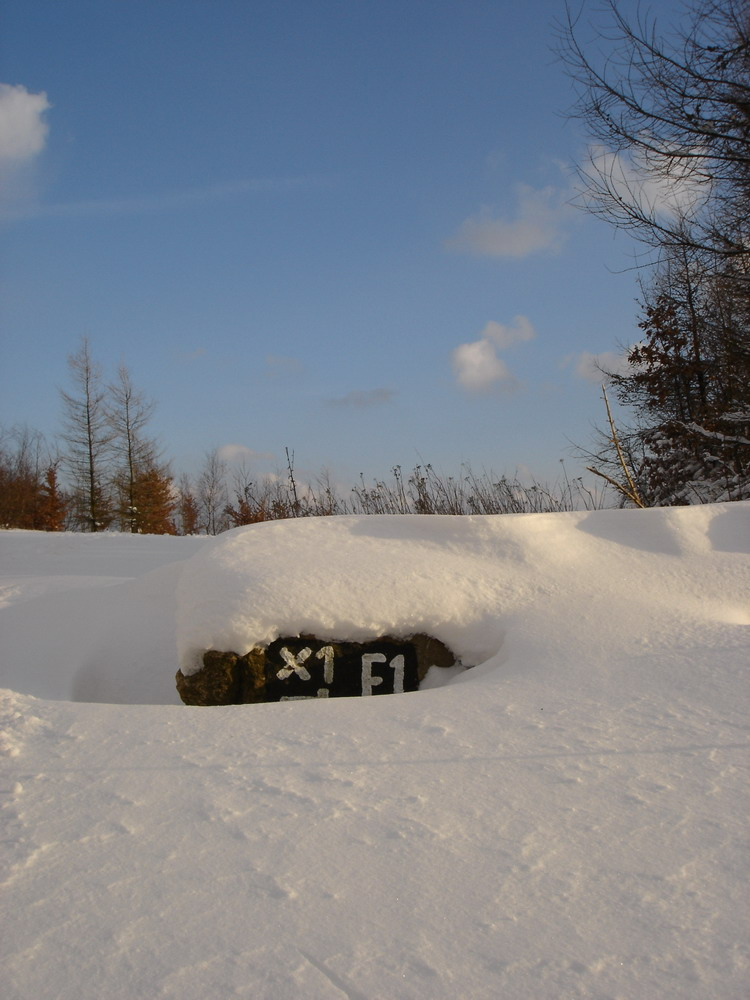 Eggeweg-Zeichen im Winter nahe dem Preußischen Velmerstot